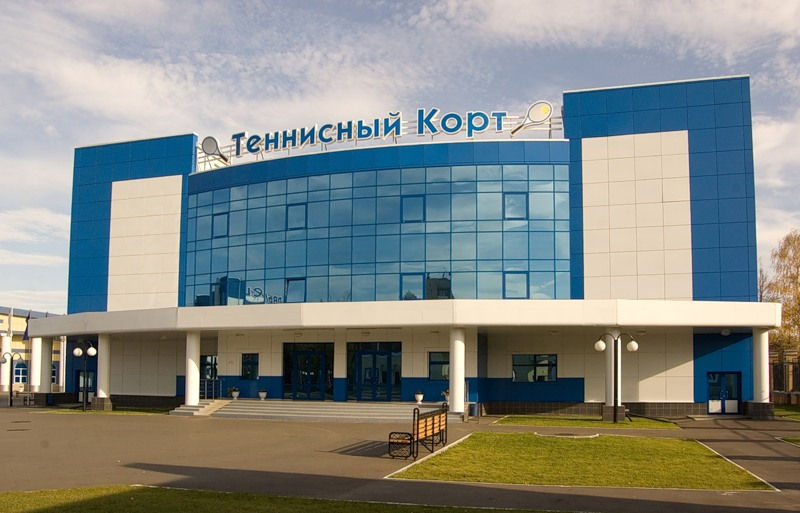 Тениисный корт, Йошкар-Ола